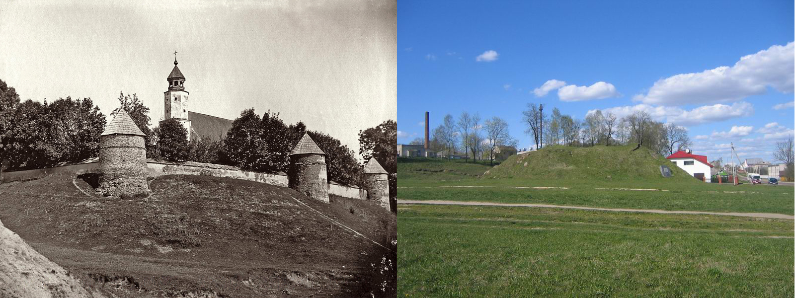 Беларуская (тарашкевіца): Маскалізацыя (русіфікацыя) Вялікага Княства Літоўскага. Места Койданаў Менскага павету. Замак і кальвінскі, помнік архітэктуры рэнэсансу: аўтэнтычны выгляд і па руйнаваньні савецкімі ўладамі